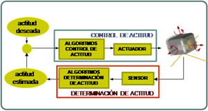 SDCA